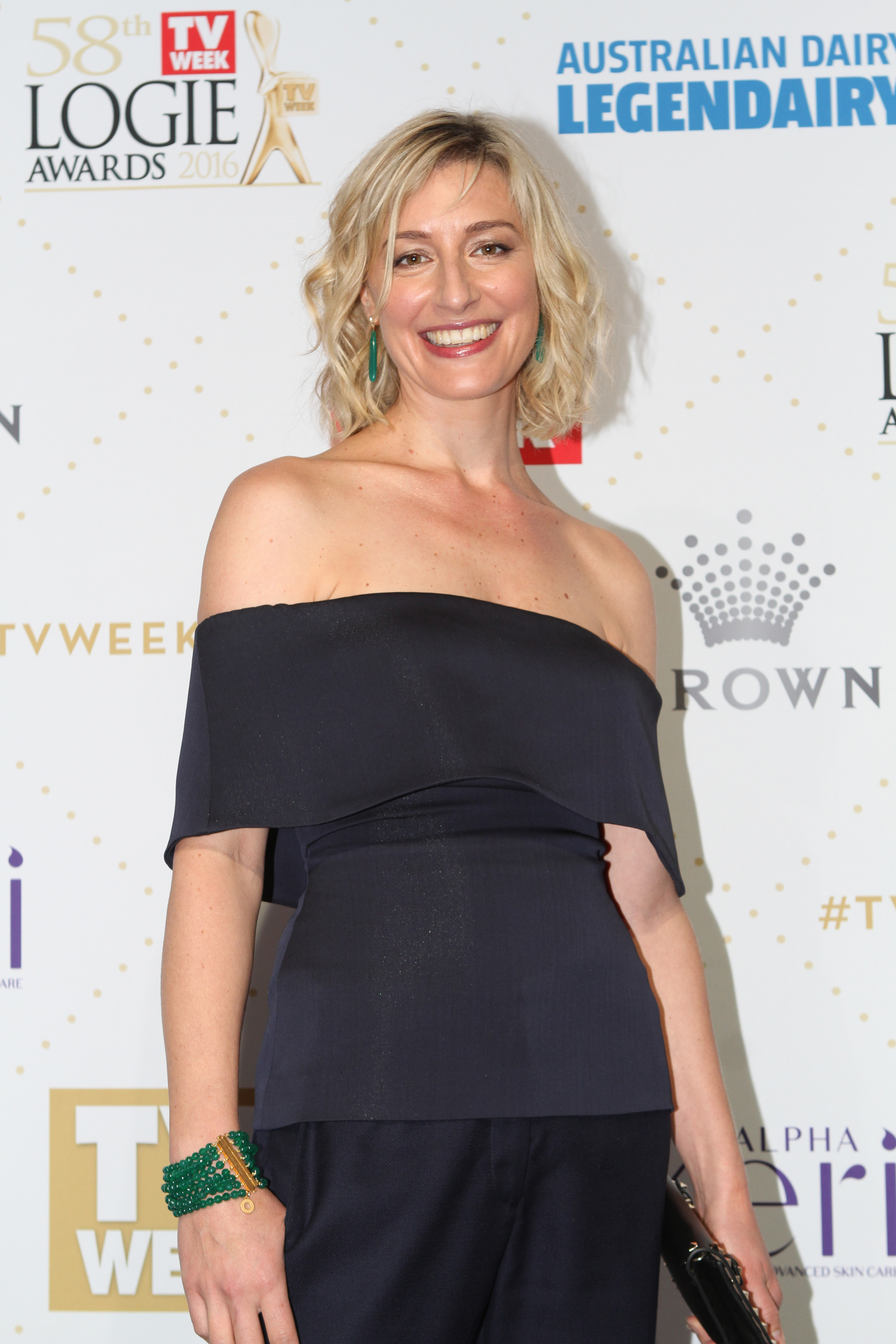 Sybilla Budd 2016 TV Week Logie Awards